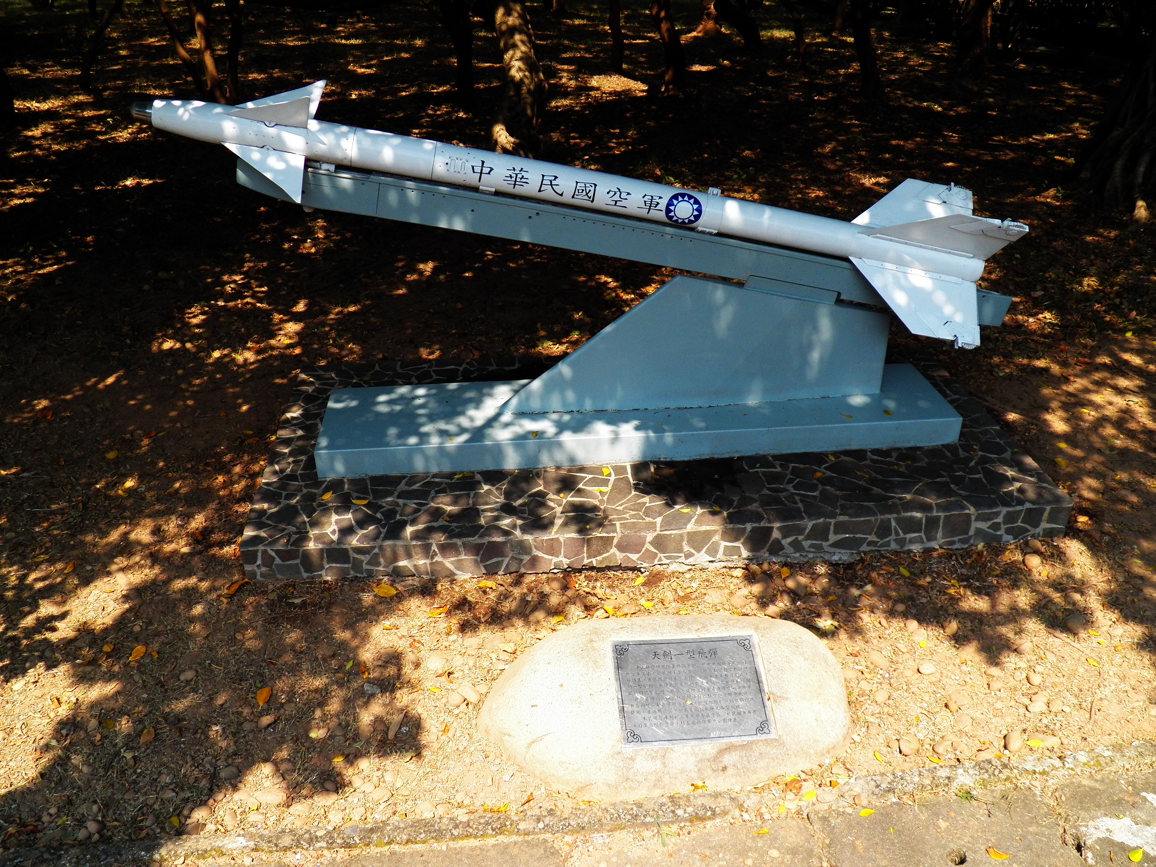 成功嶺展示之天劍一型飛彈，原置於三軍大學率真營區，1997年移設於此。